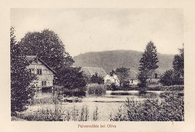 Młyn Prochowy, Oliwa (Gdańsk).